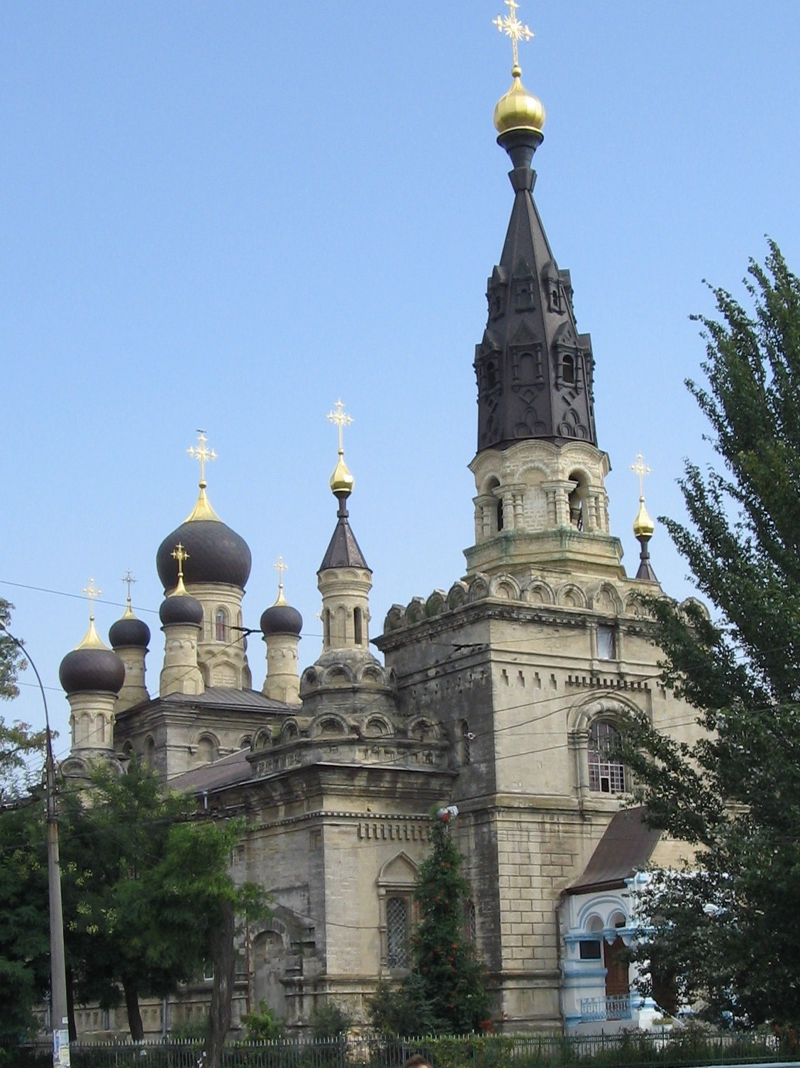 Касперовский собор в Николаеве